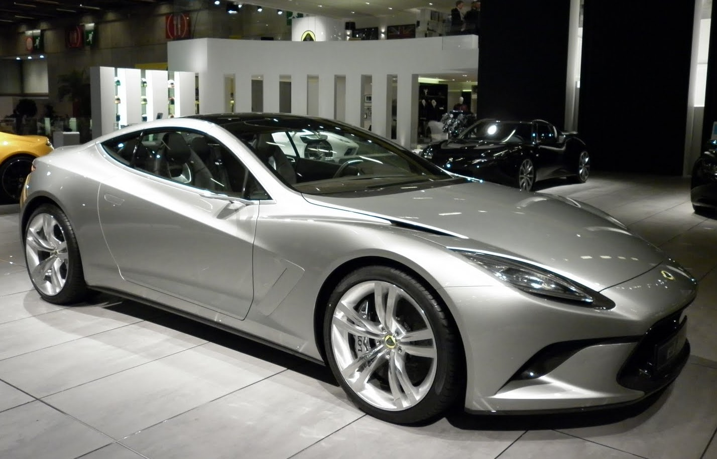 Stand Lotus Mondial de Paris